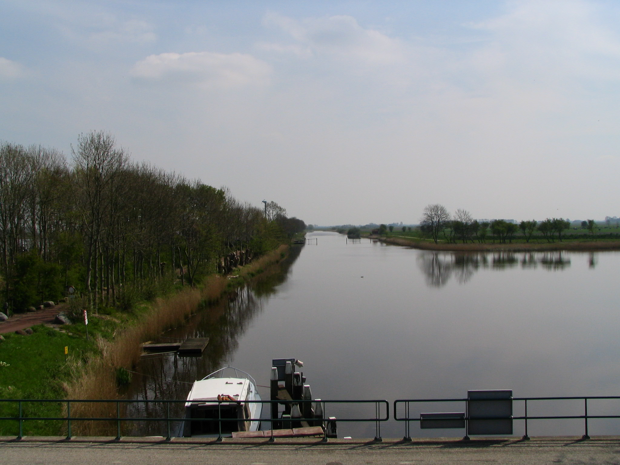 Het Munnikezijlsterriet vanaf de Friese sluis.